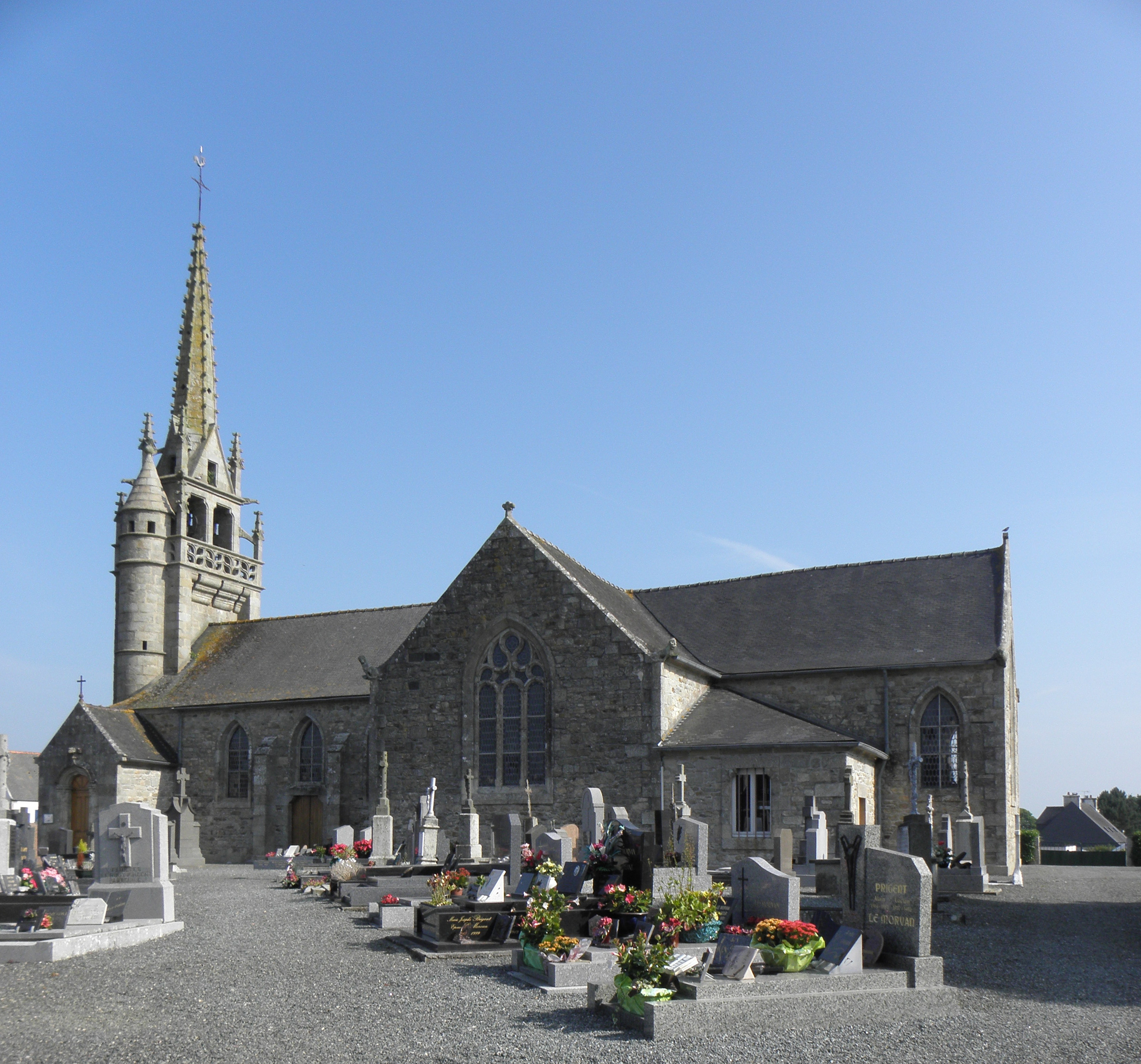 Église Saint-Pierre de Plouégat-Moysan (29). Vue méridionale.